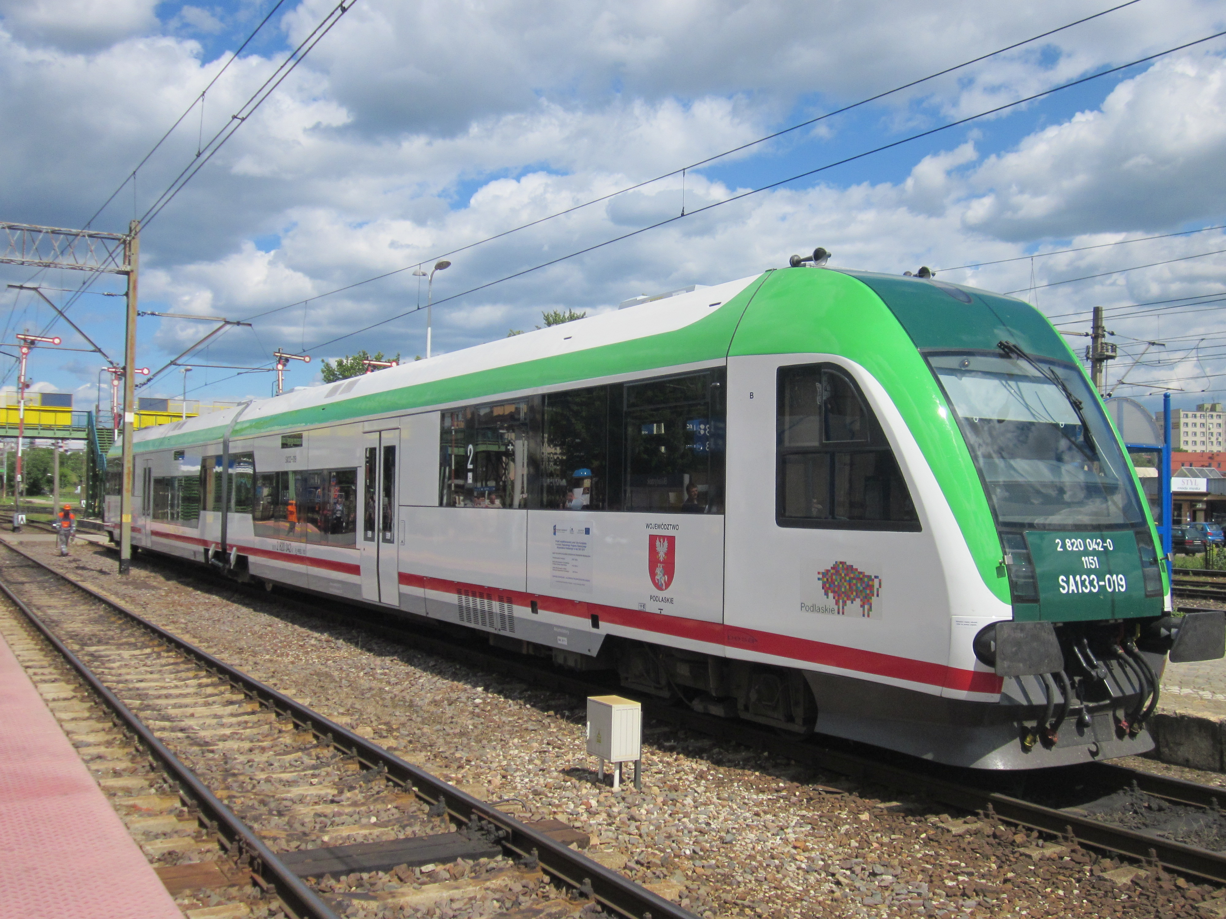 Szynobus SA 133 w Białymstoku z serii PESA 218Mx